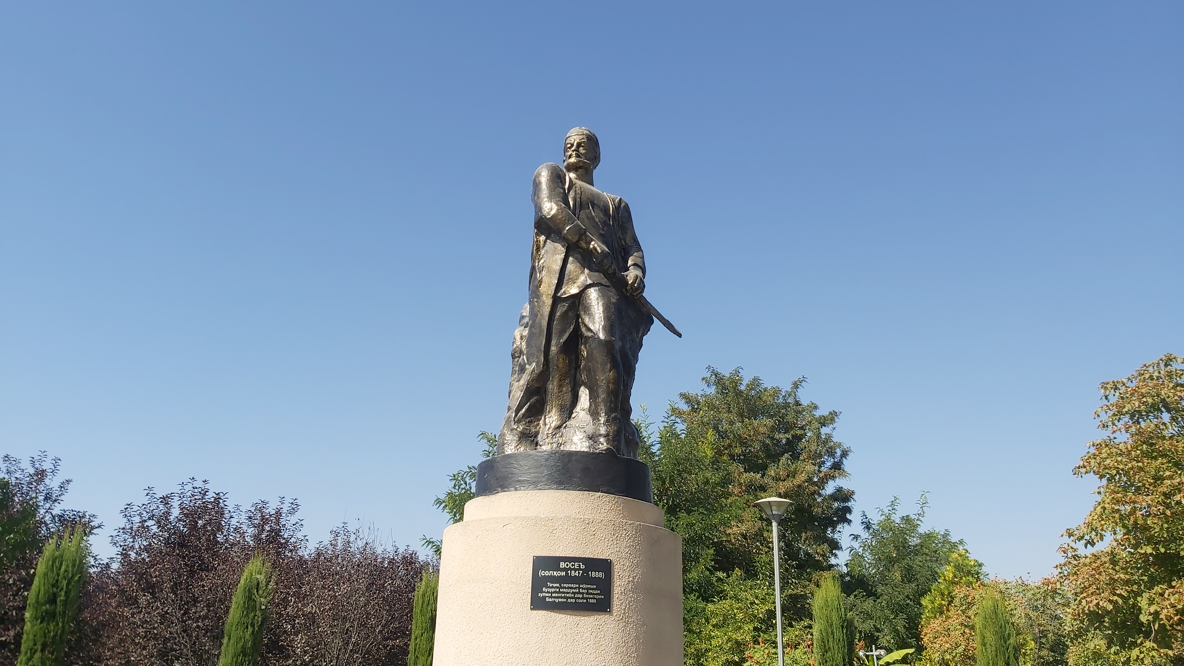 Памятник Восе